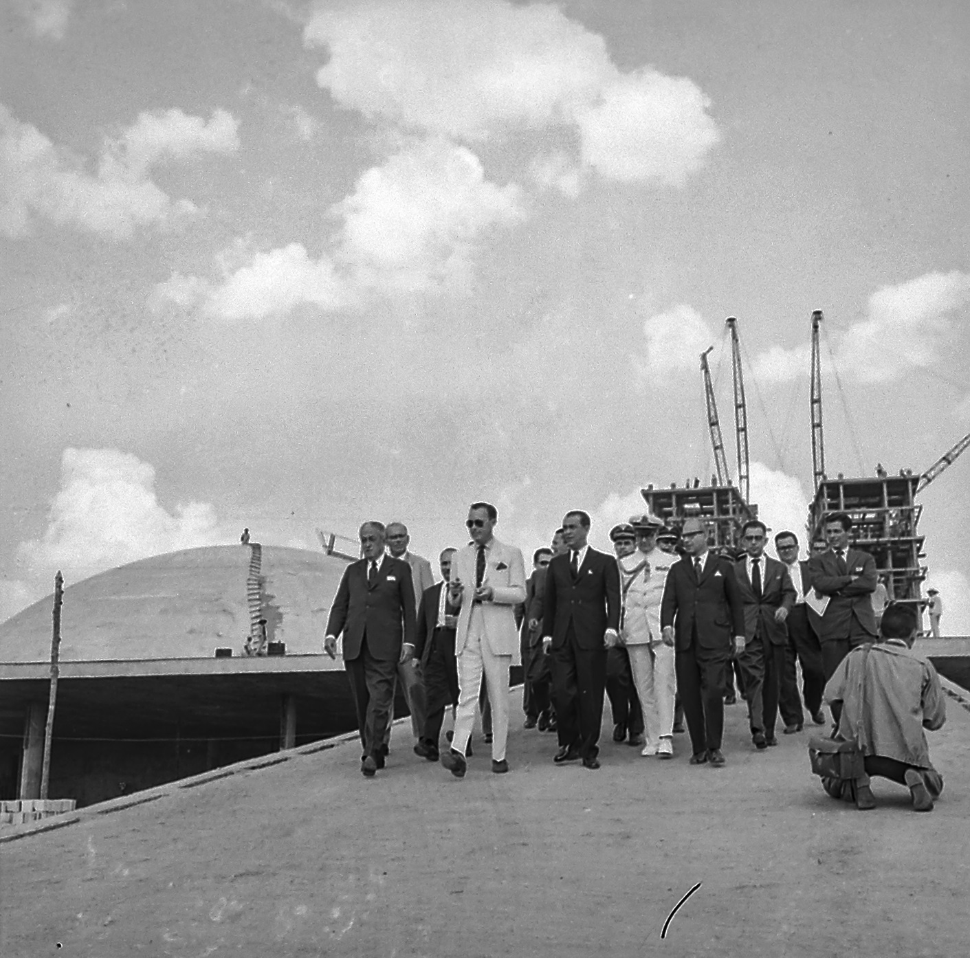 Imagem do Fundo Agência Nacional, do Arquivo Nacional